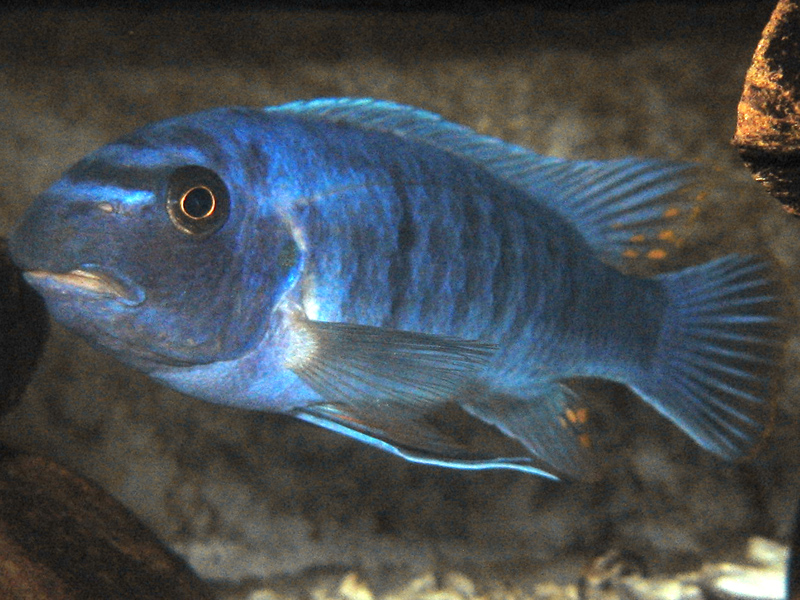 Ciclideo africano do lago Malawi - Labeotropheus trewavasae